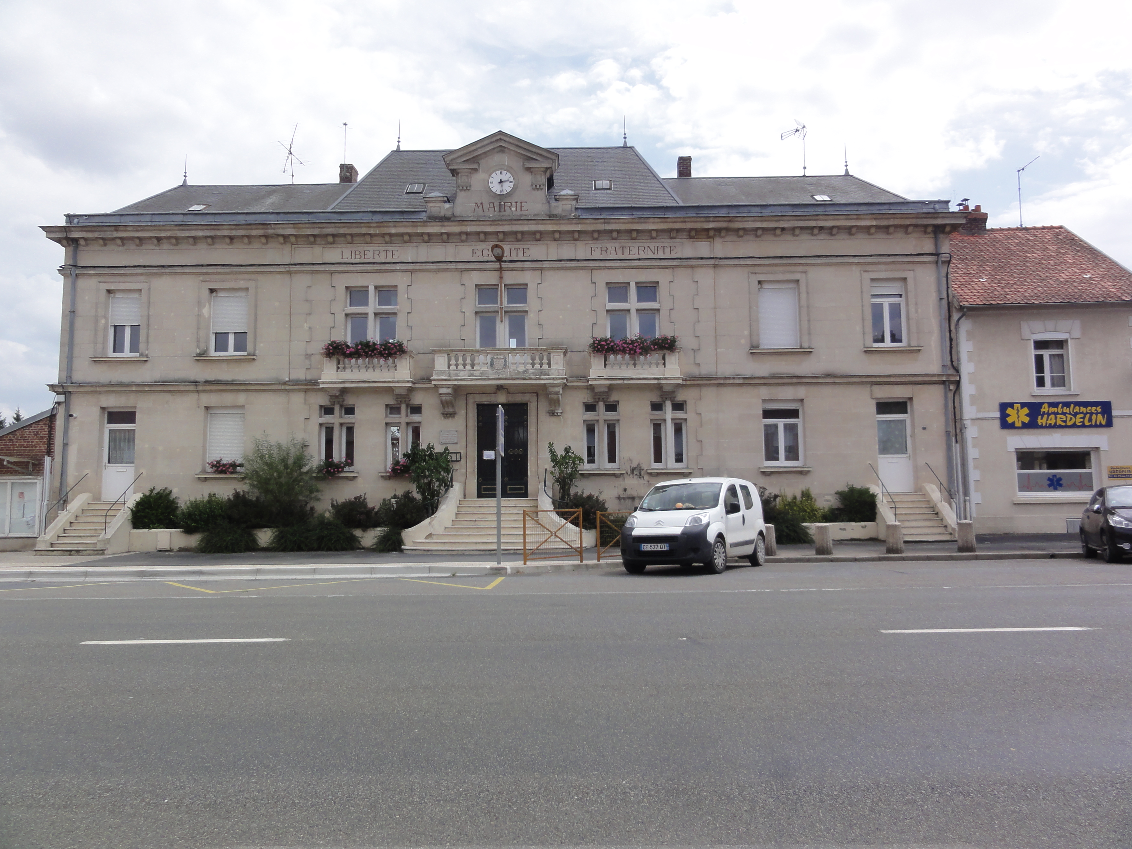 Le Catelet (Aisne) mairie